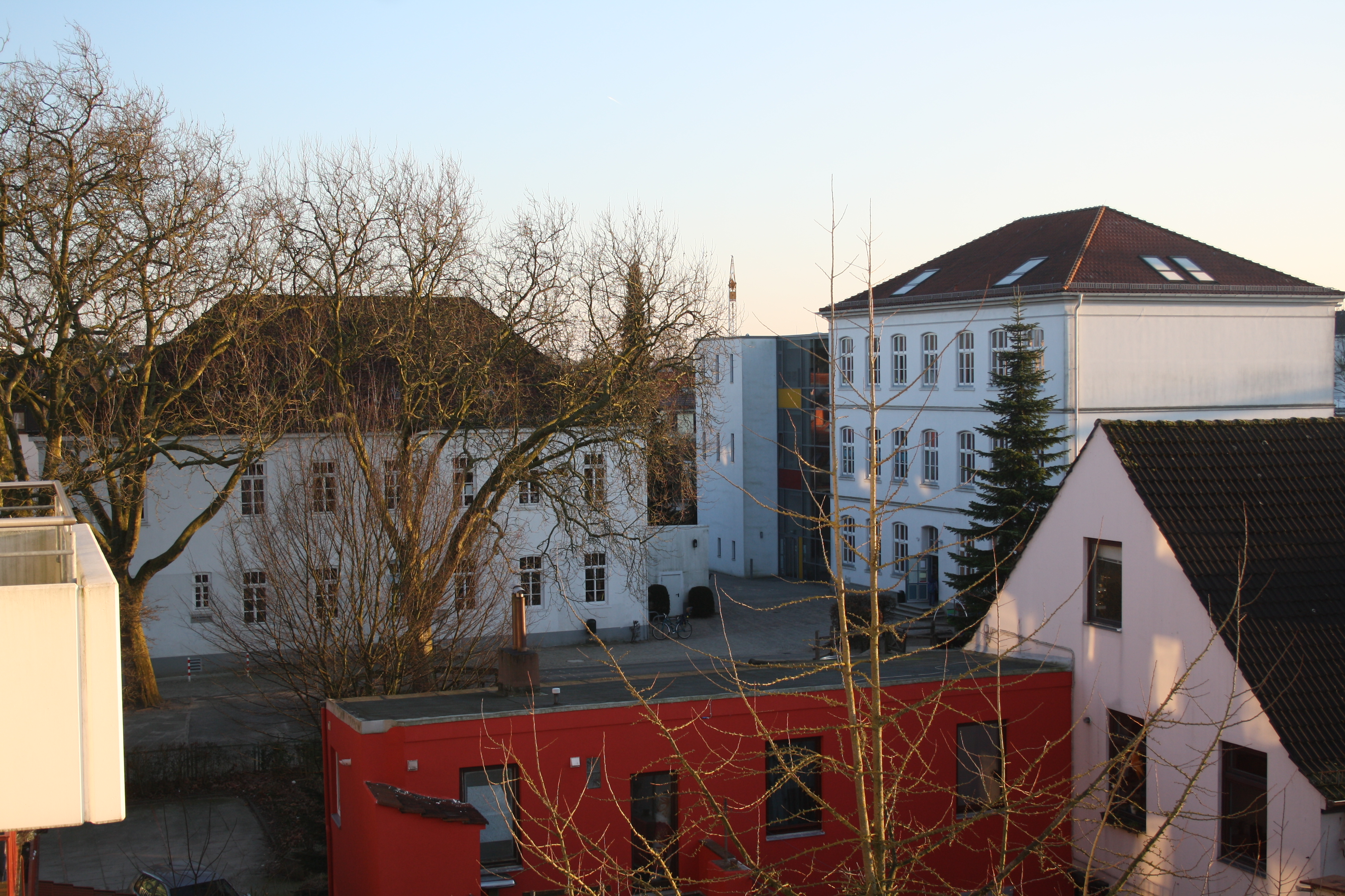 Mittleres Gebäude der Grundschule Buntentorsteinweg in Bremen